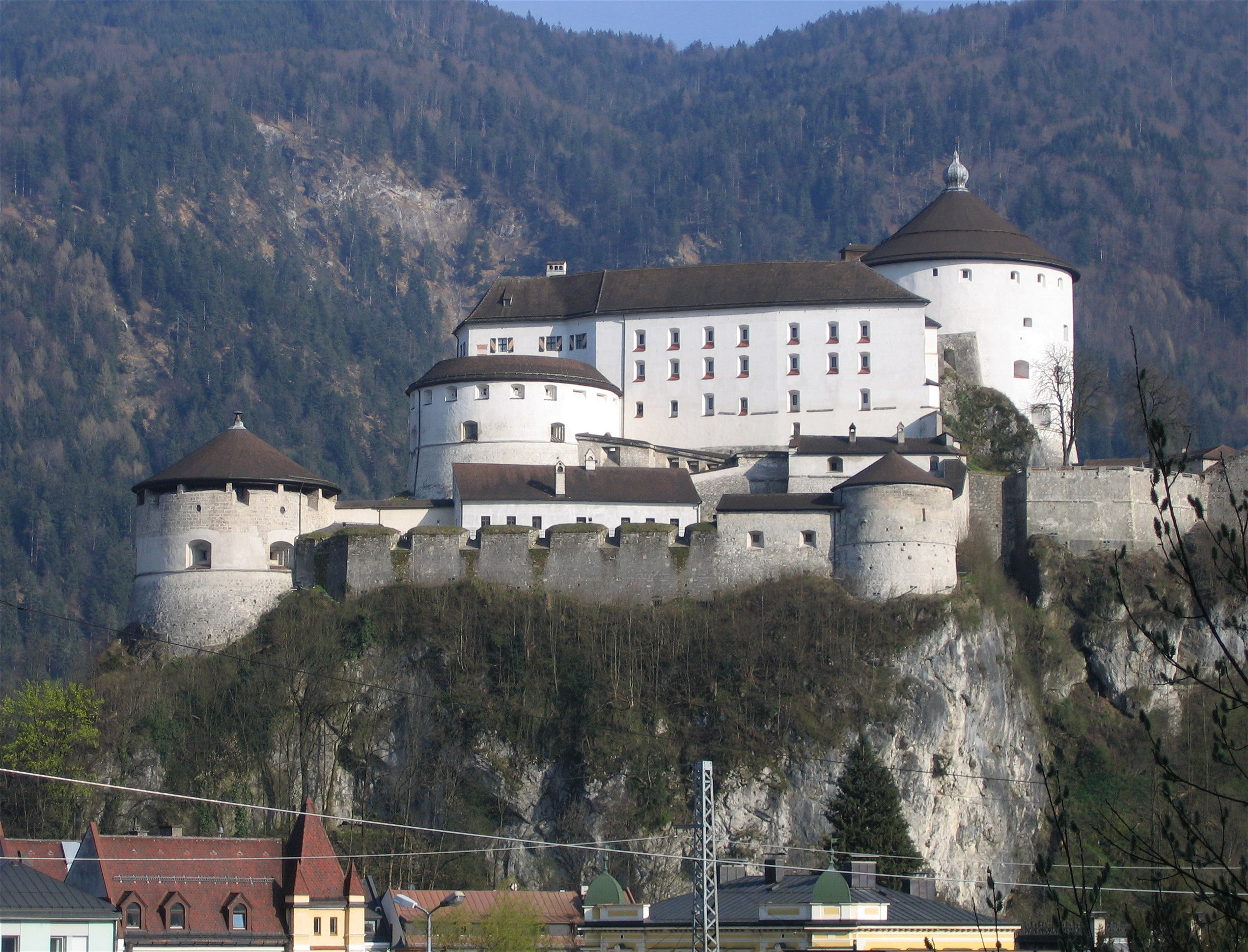 Festung Kufstein